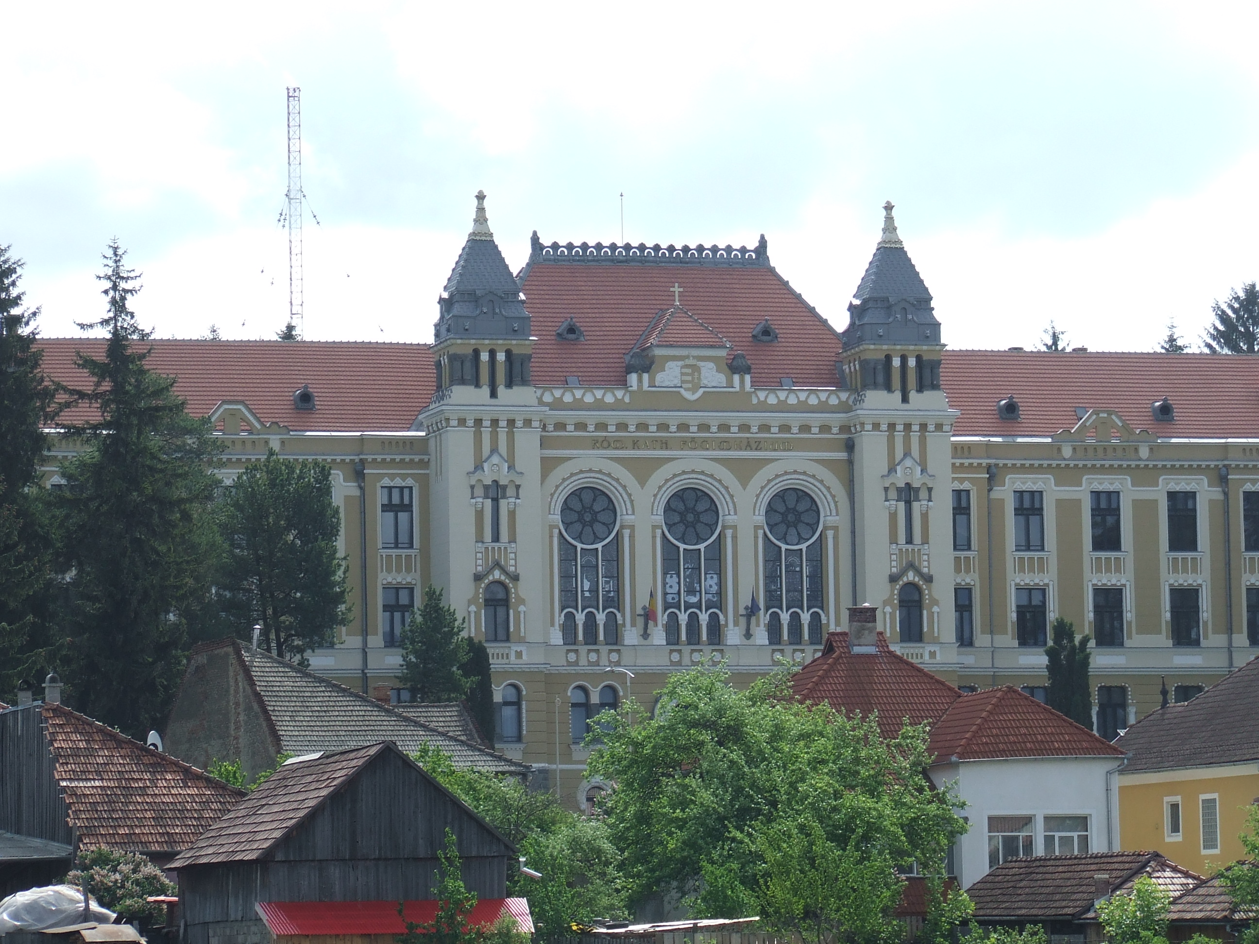 Csíkszereda, Segítő Mária Gimnázium